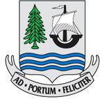 Armoiries de Port-Cartier